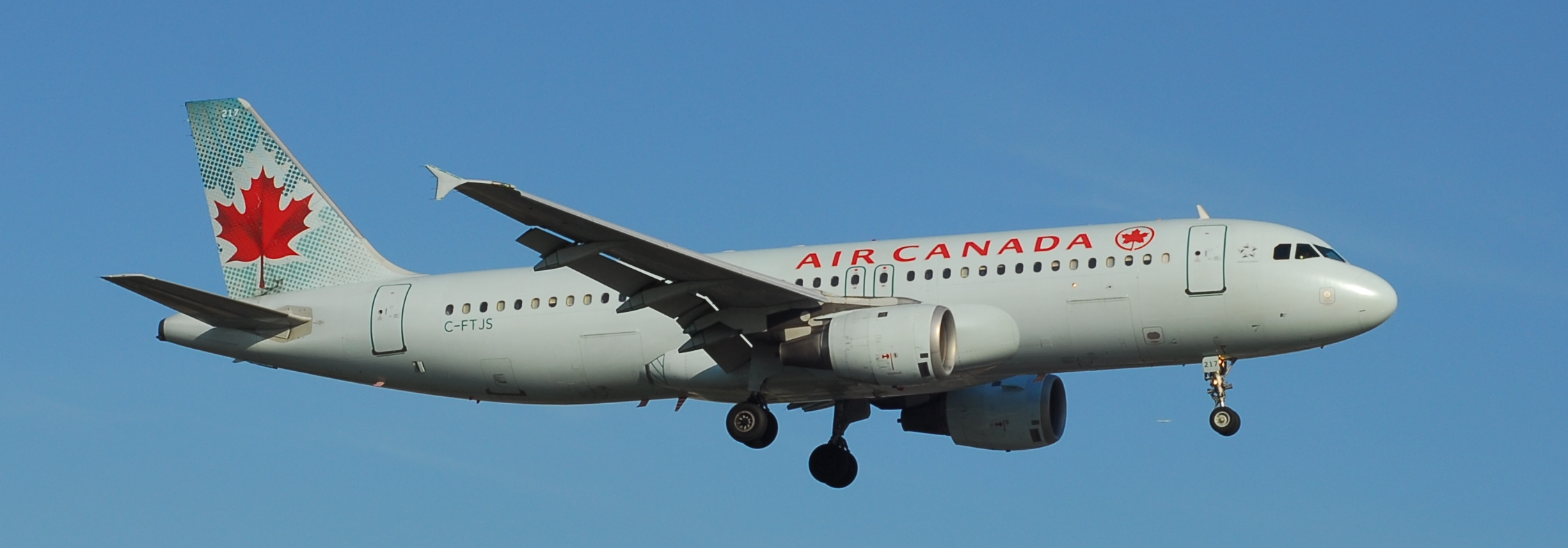 DSC_0345 cropped